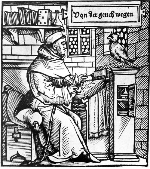 Thomas Murner als Kanzler der Geuchmatt